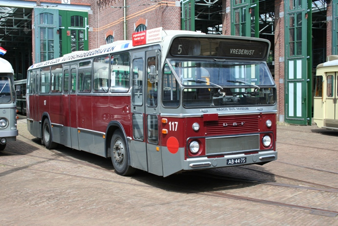 HTM 117: DAF SB200DO554/Verheul (CSA-I), bouwjaar 1967, van de eerste serie, 25 stuks nog met Leyland motor. Daarna DAF. Zie ook het artikel over het Haags Bus Museum voor meer informatie.